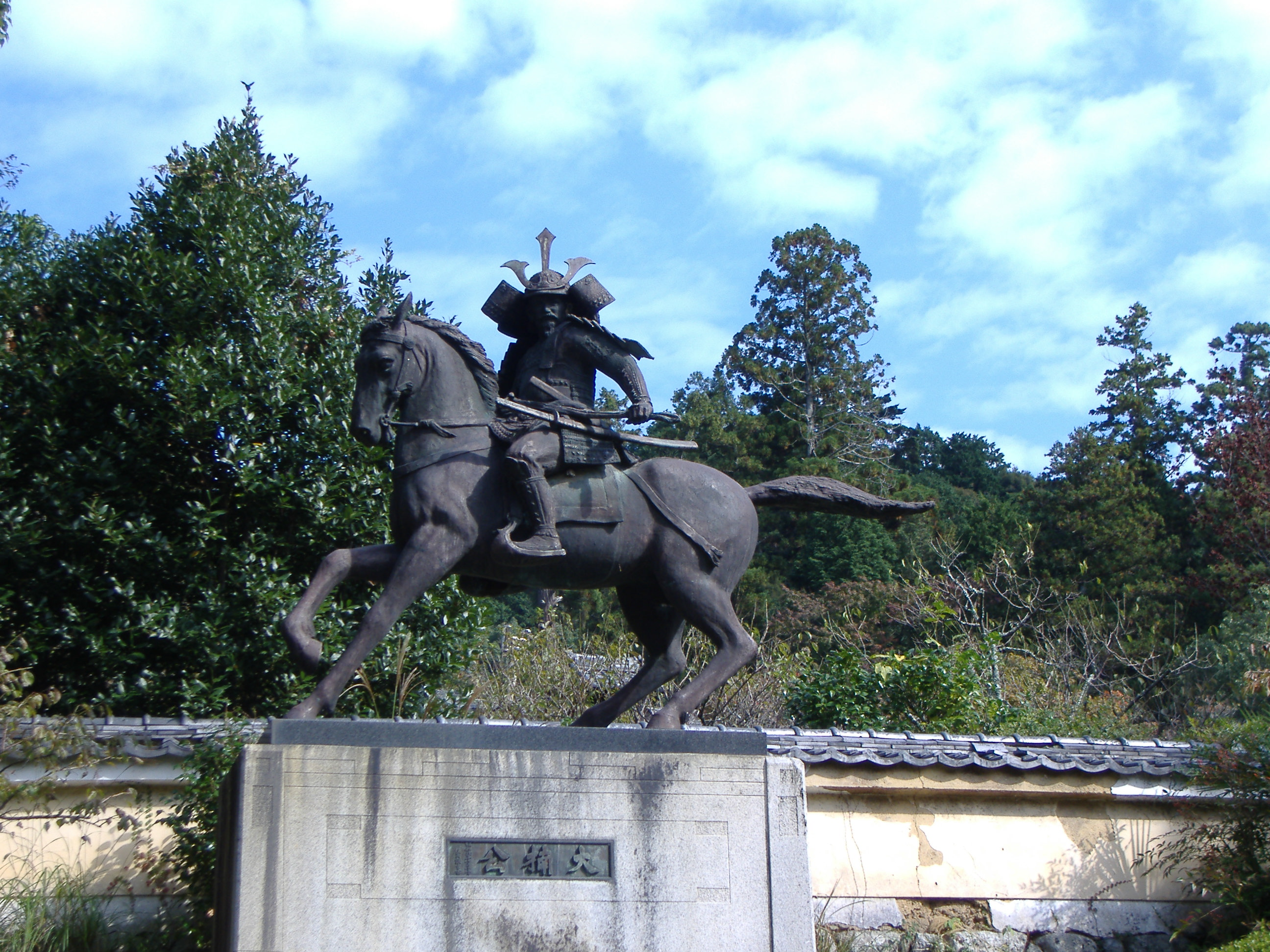 観心寺にある楠木正成像